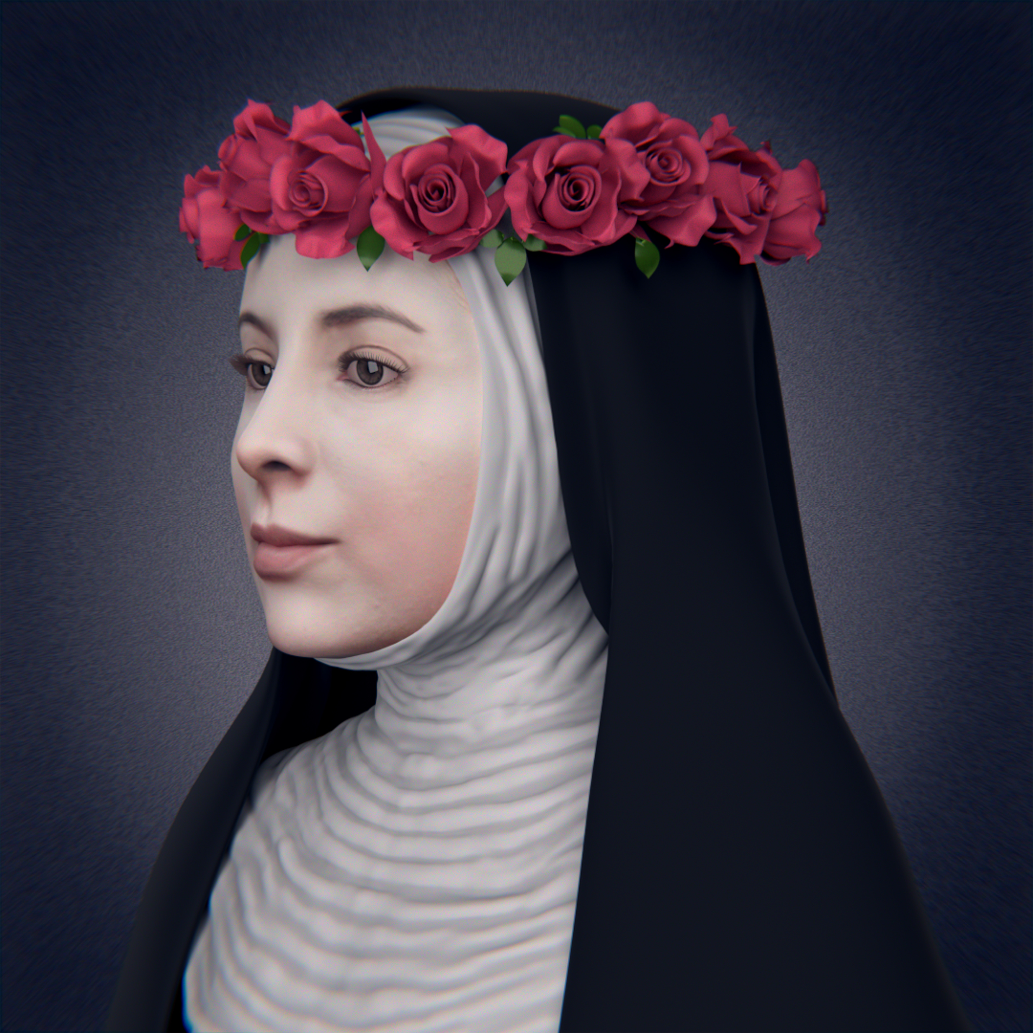 Esta é a face de Santa Rosa de Lima, reconstruída pelo 3D designer Cícero Moraes a partir do estudo de seu crânio, o qual se encontra no Convento de Santo Domingo na cidade de Lima, no Peru. Esse projeto foi realizado graças ao trabalho da Equipe Brasileira de Antropologia Forense e Odontologia Legal (Ebrafol) sob a responsabilidade técnica e científica do Prof. Dr. Paulo Eduardo Miamoto Dias, especialista em Odontologia Legal, com o patrocínio da Faculdade FASIPE de Sinop-MT e da Paróquia Santa Rosa de Lima em Guarujá-SP, com o apoio logístico da Sociedad Peruana de Odontología Legal Forense y Criminalística (Spolfoc), da Universidad Inca Garsilaso de la Vega e da Universidad San Martín de Porres, todas localizadas em Lima, Peru. Todo o processo de análise antrooplógica foi documentado pela L8 Filmes de Sinop-MT.